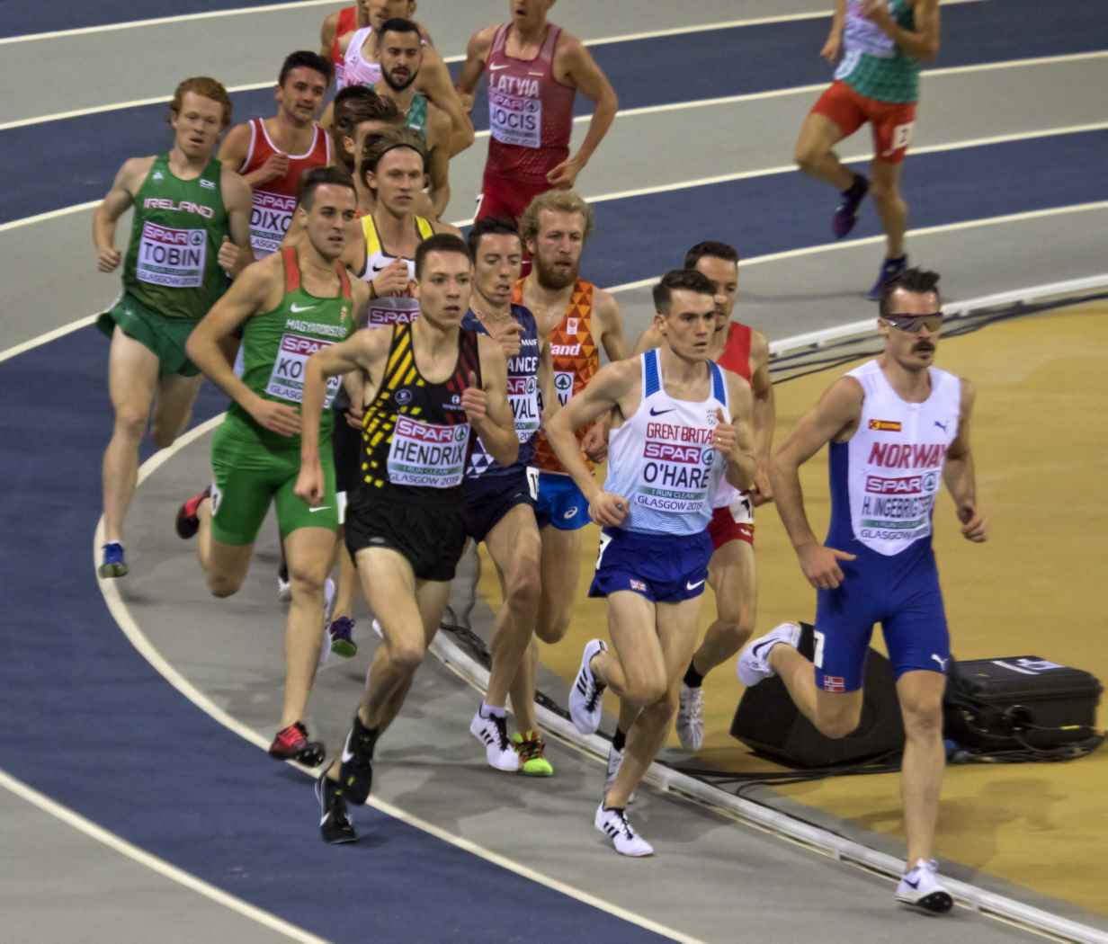 EKI10295 hendrix reeksen 3000m